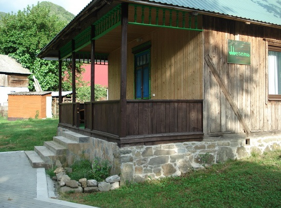 Адыгэбзэ: Тхьэгъэпш дэт мэжджыт